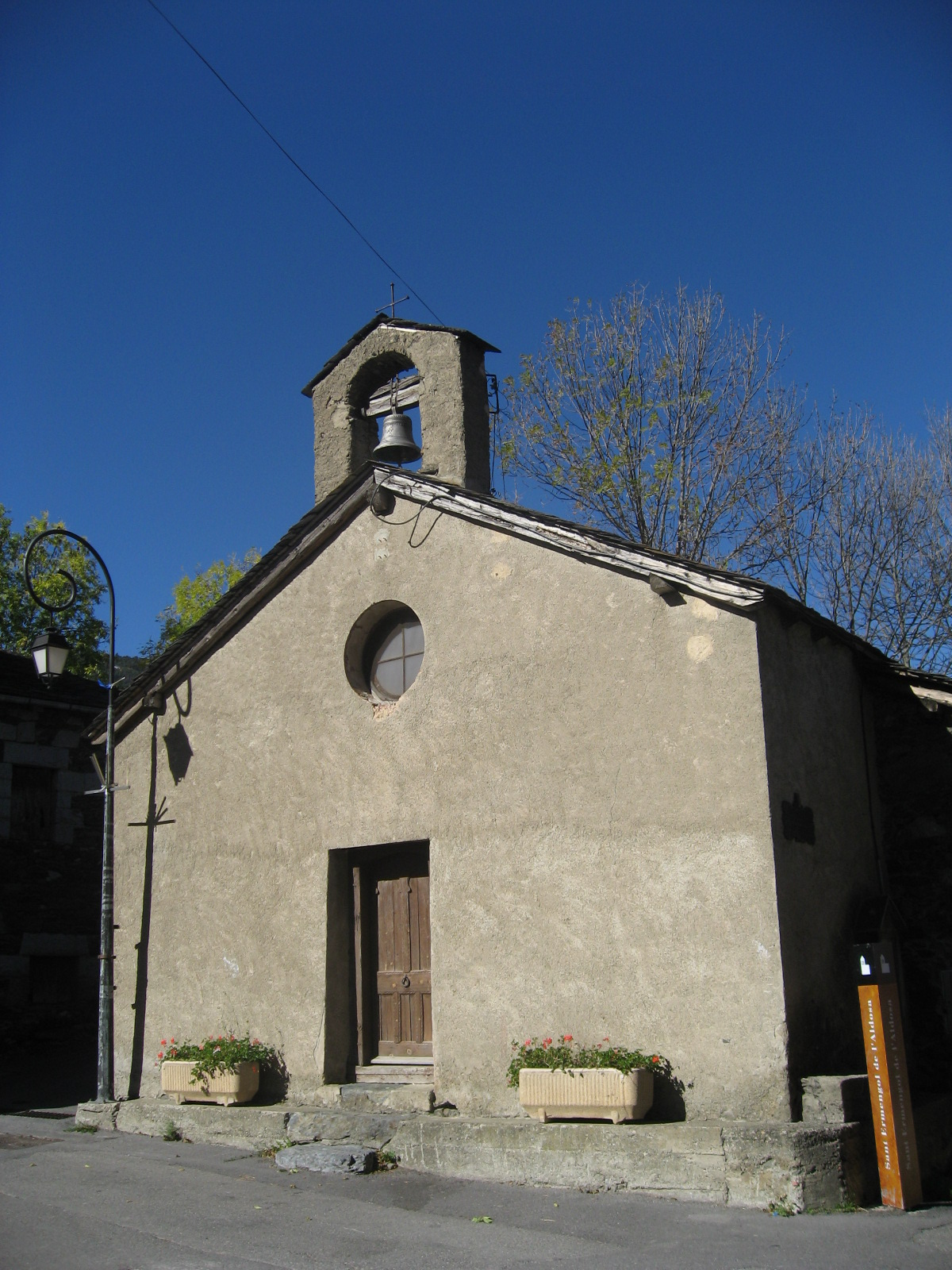 Sant Armengol de l'Aldosa